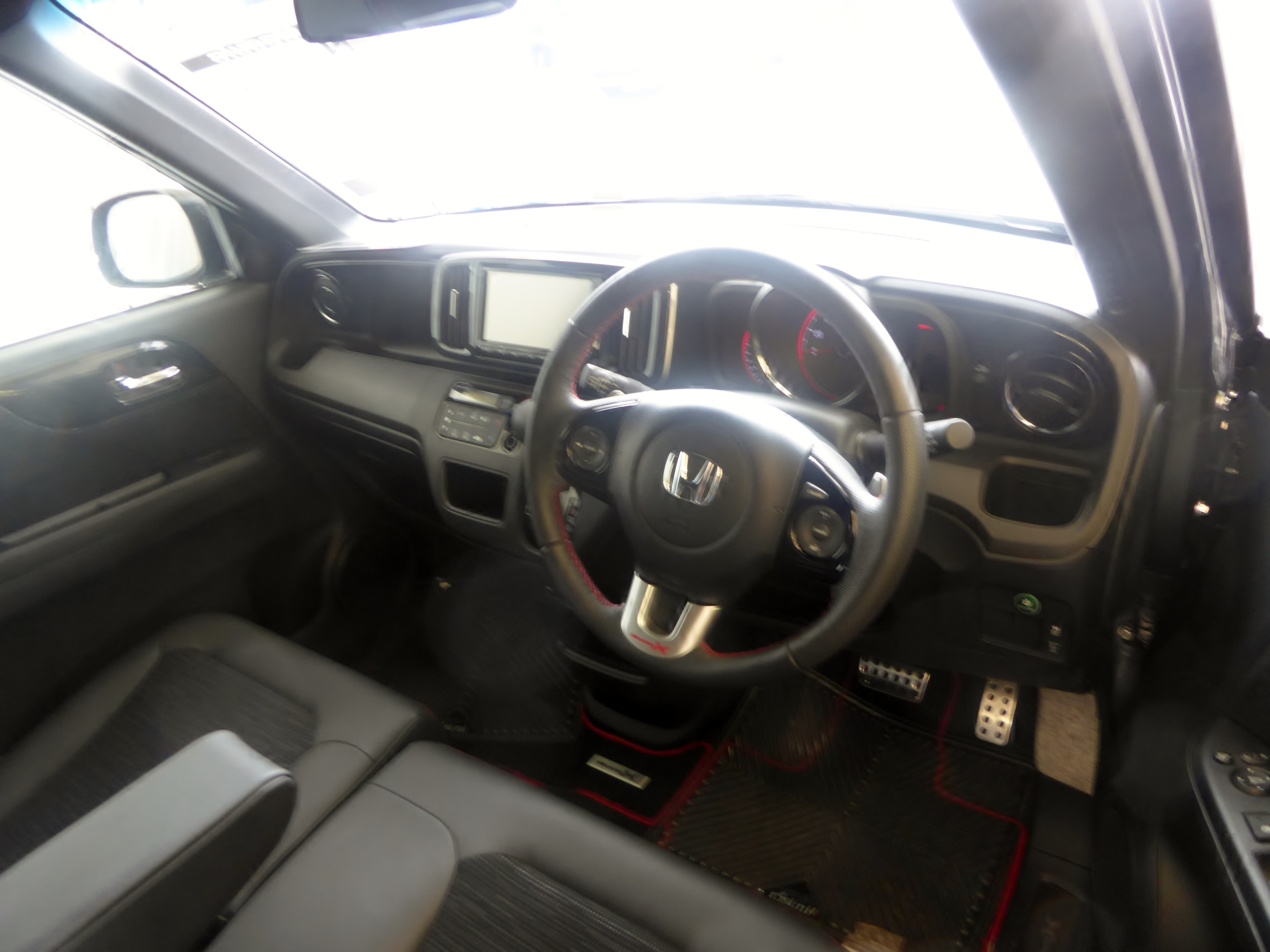 JG1型ホンダ・N-ONE Modulo Xのインテリアを撮影。